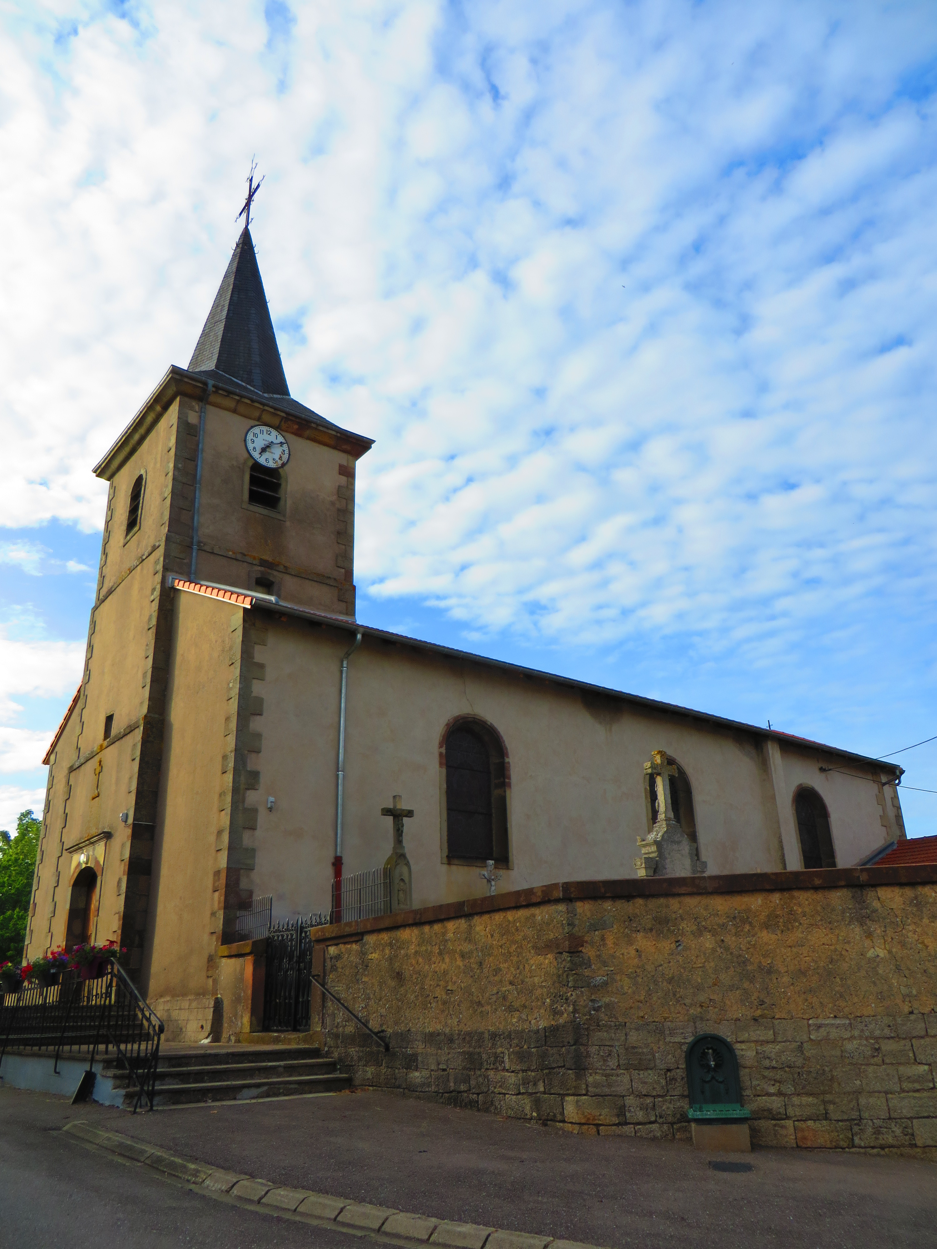 Ommeray eglise